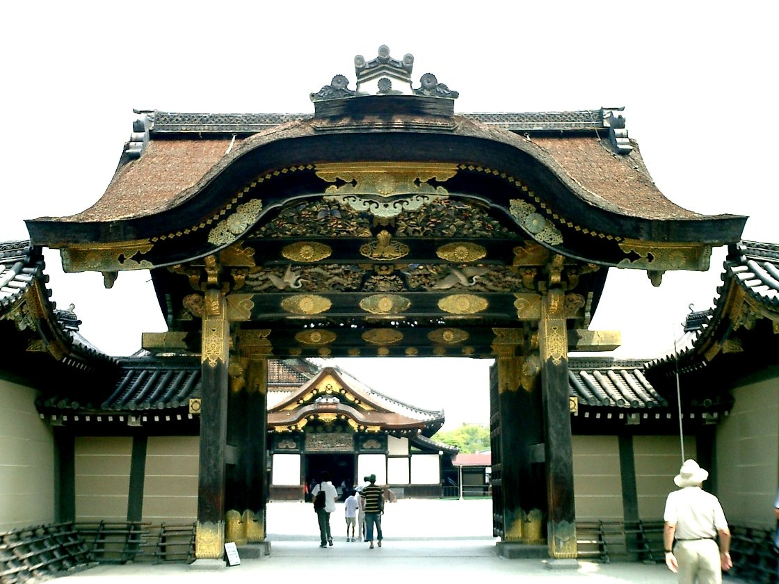 Nijo_Castle_Karamon